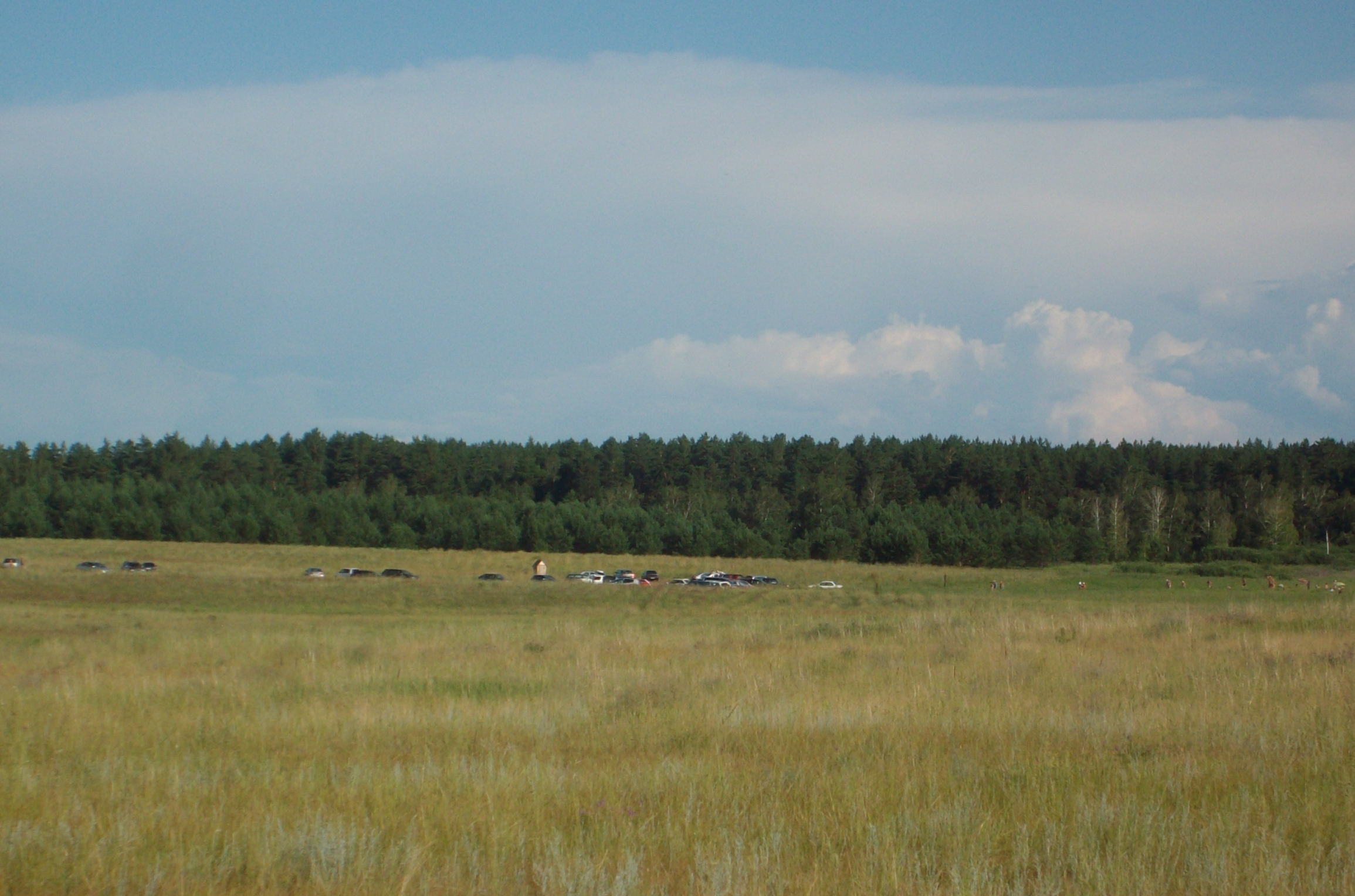 Соленое озеро в окрестностях с. Светлое Завьяловский район Алтайского края, Россия